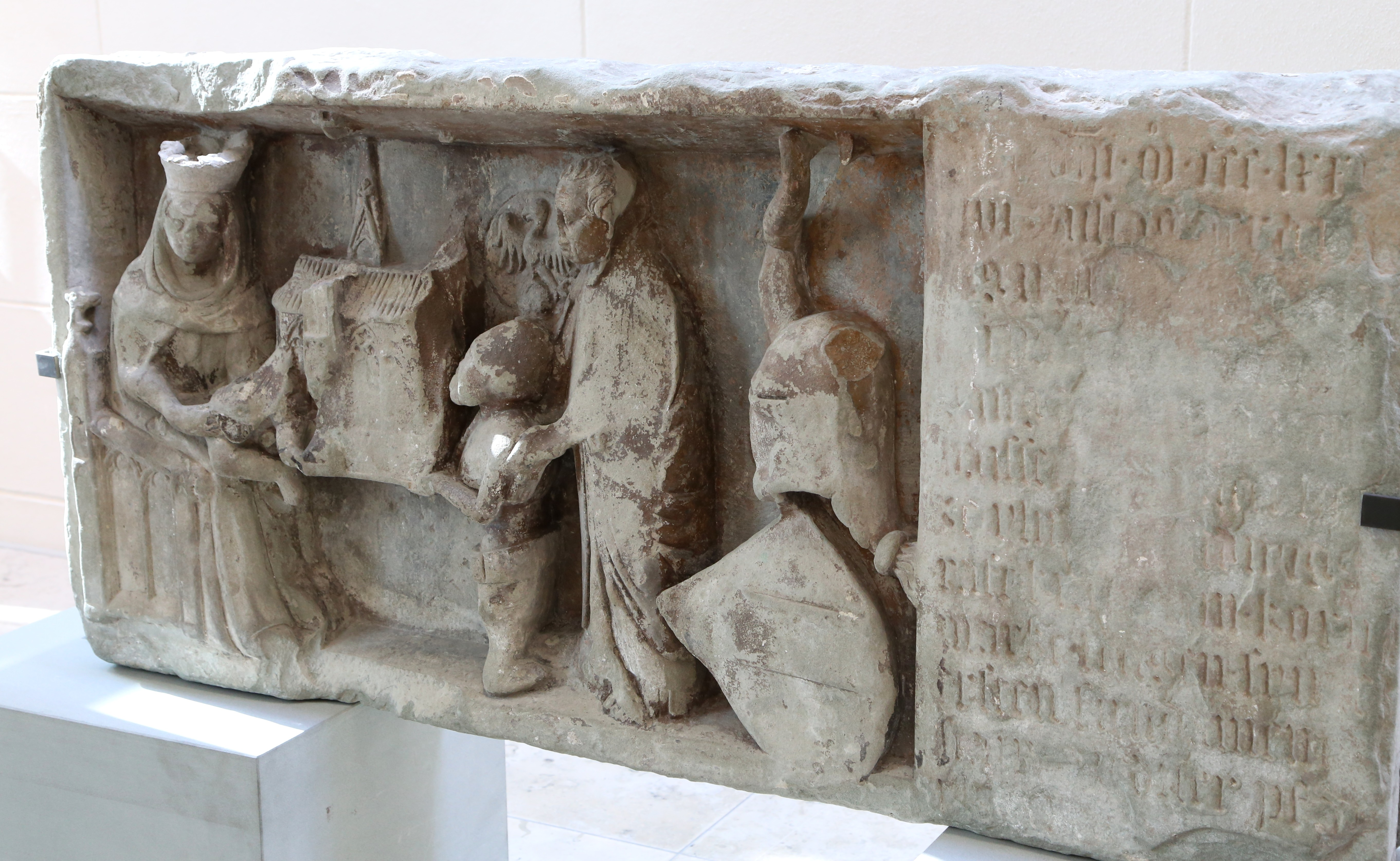 Grundsteinlegungsrelief des Ulmer Münsters, Ulm, kurz nach 1377, Sandstein, Reste einer farbigen Fassung; Ulmer Museum